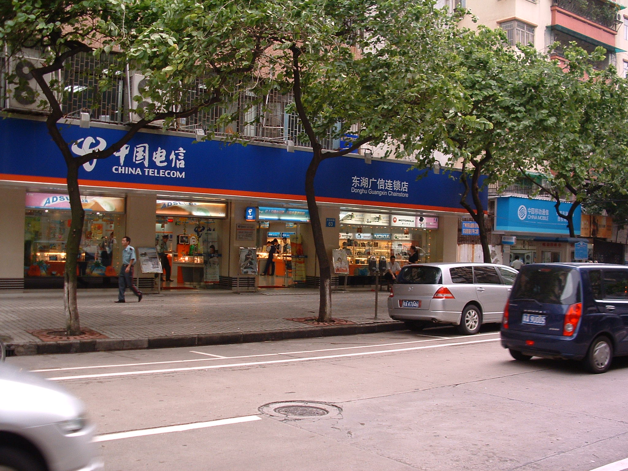 中国电信广州分公司，位于广州东山区东湖路的营业厅。